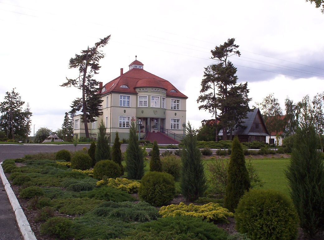 Zalesie - pałac, obecnie siedziba nadleśnictwa